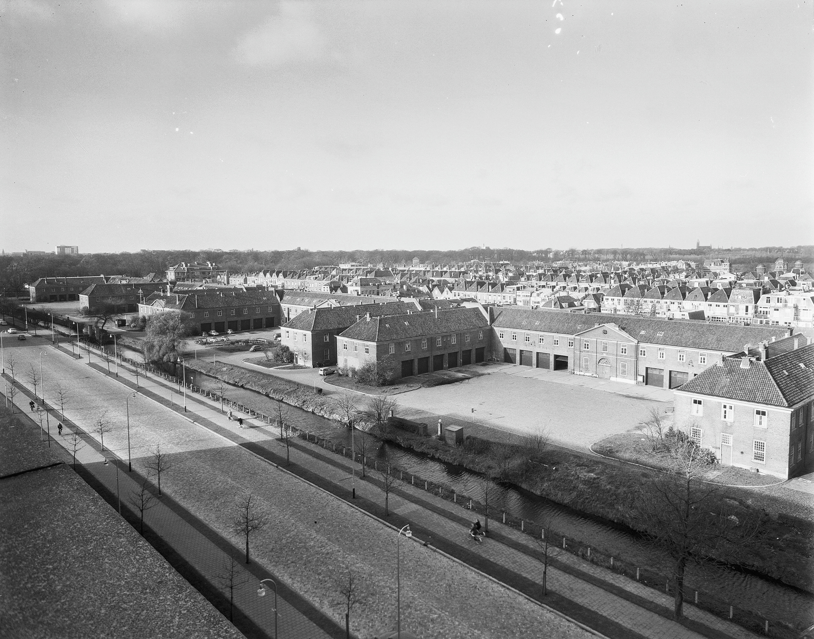 Oude Alexanderkazerne: exterieur